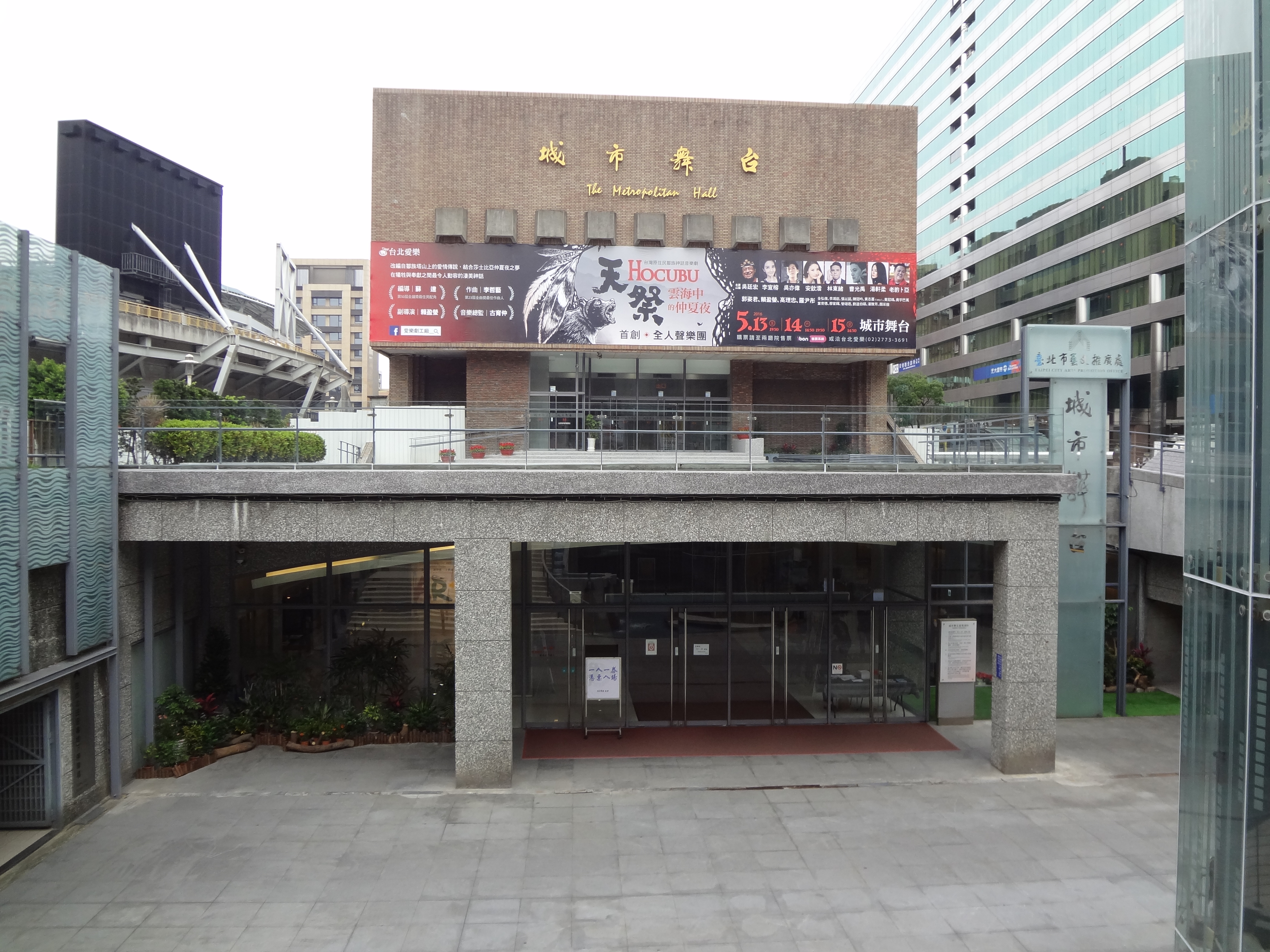 臺北市藝文推廣處城市舞台。下方為入口，上方為出口。